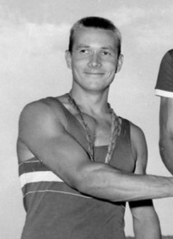 Imre Szöllősi at the 1960 Olympics